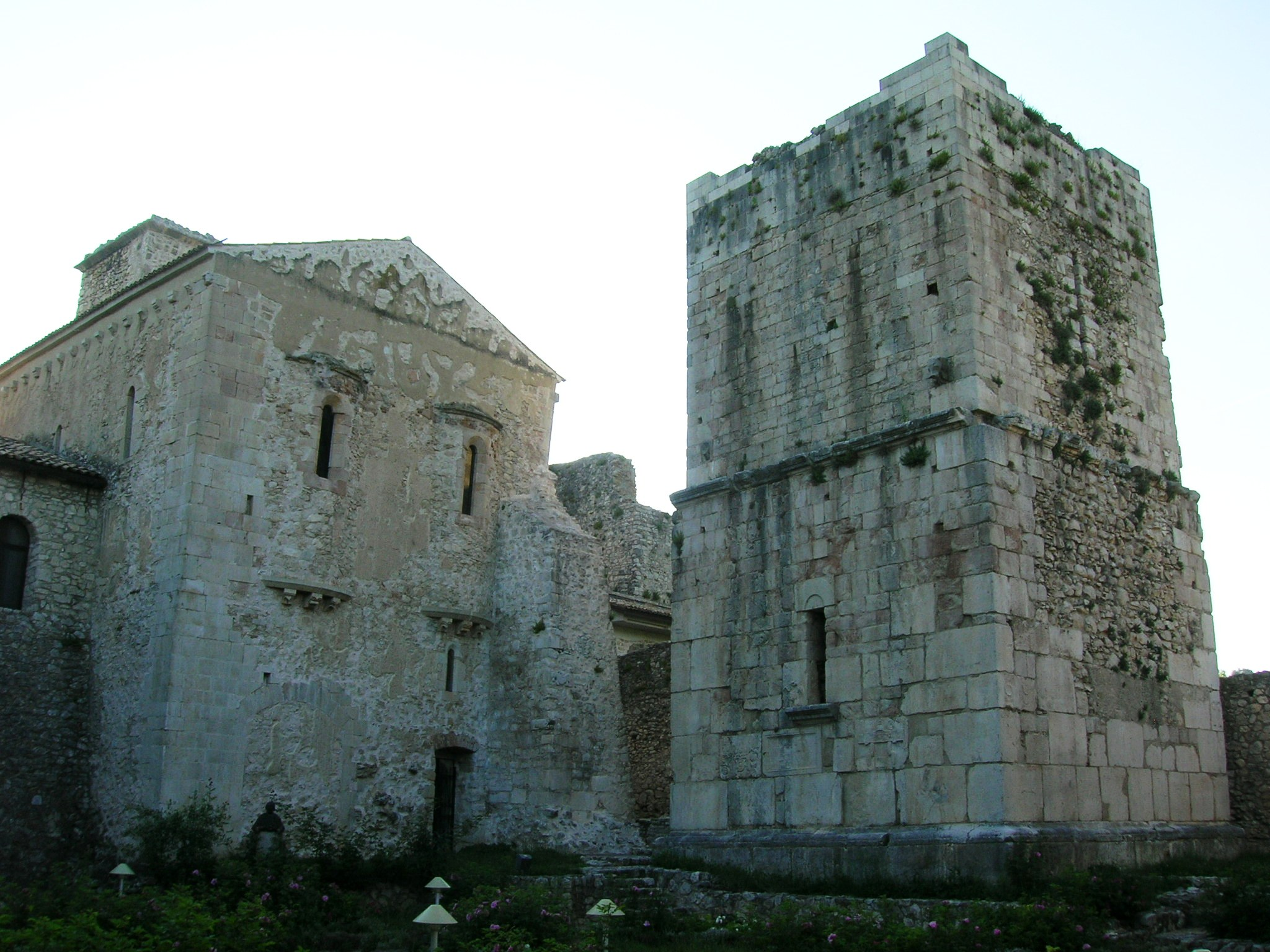 L'abbazia del Goleto a Sant'Angelo dei Lombardi